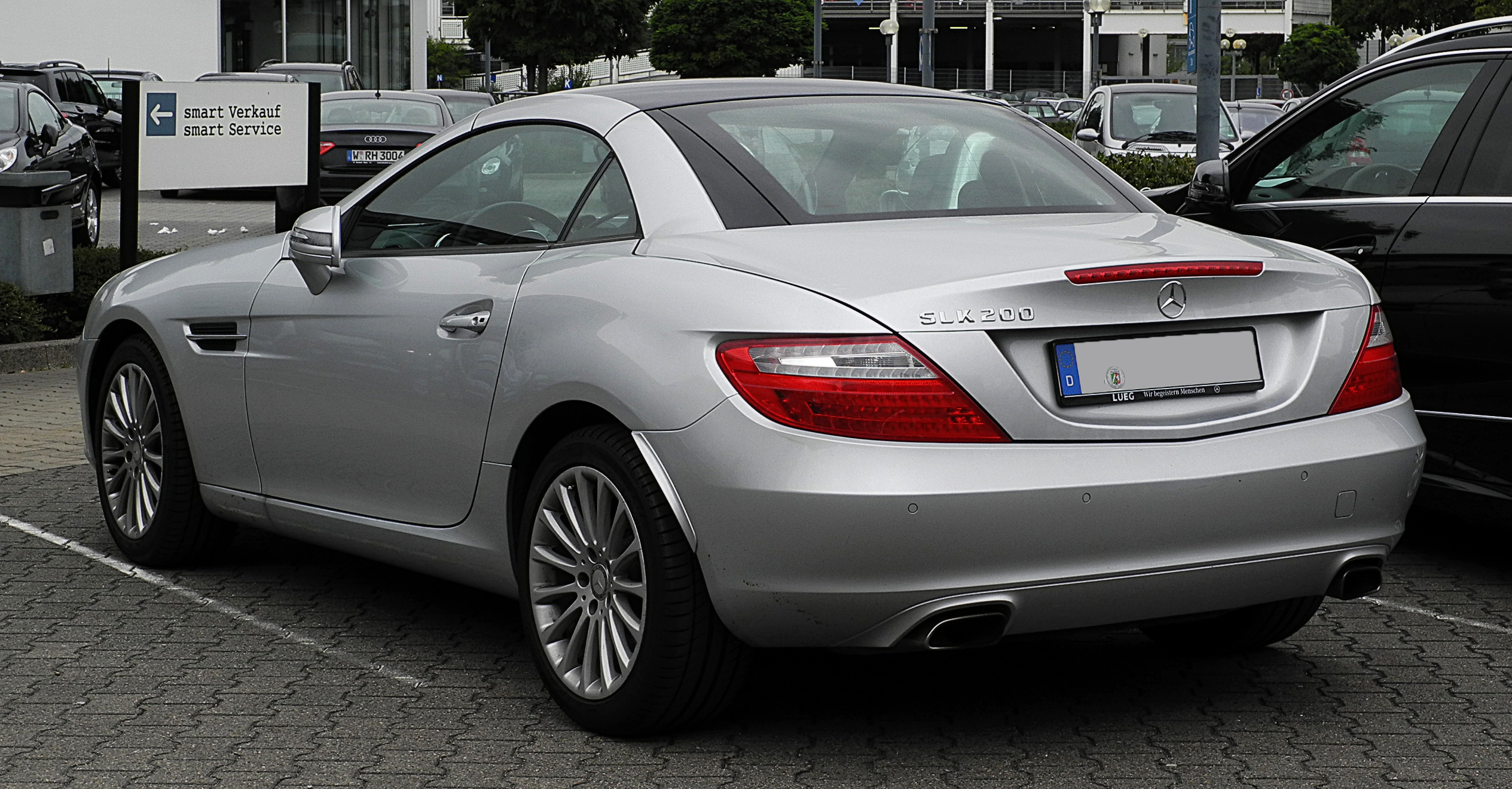 Mercedes-Benz SLK 200 BlueEFFICIENCY (R 172)